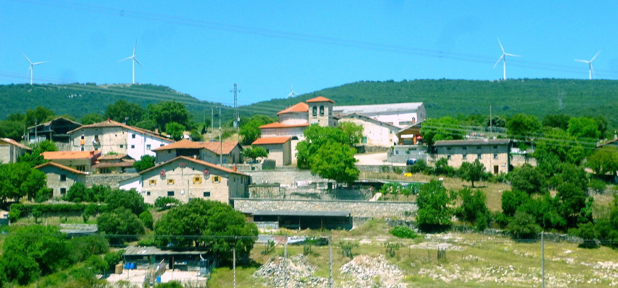 Mandaita/Montevite (Iruña de Oca, Álava)